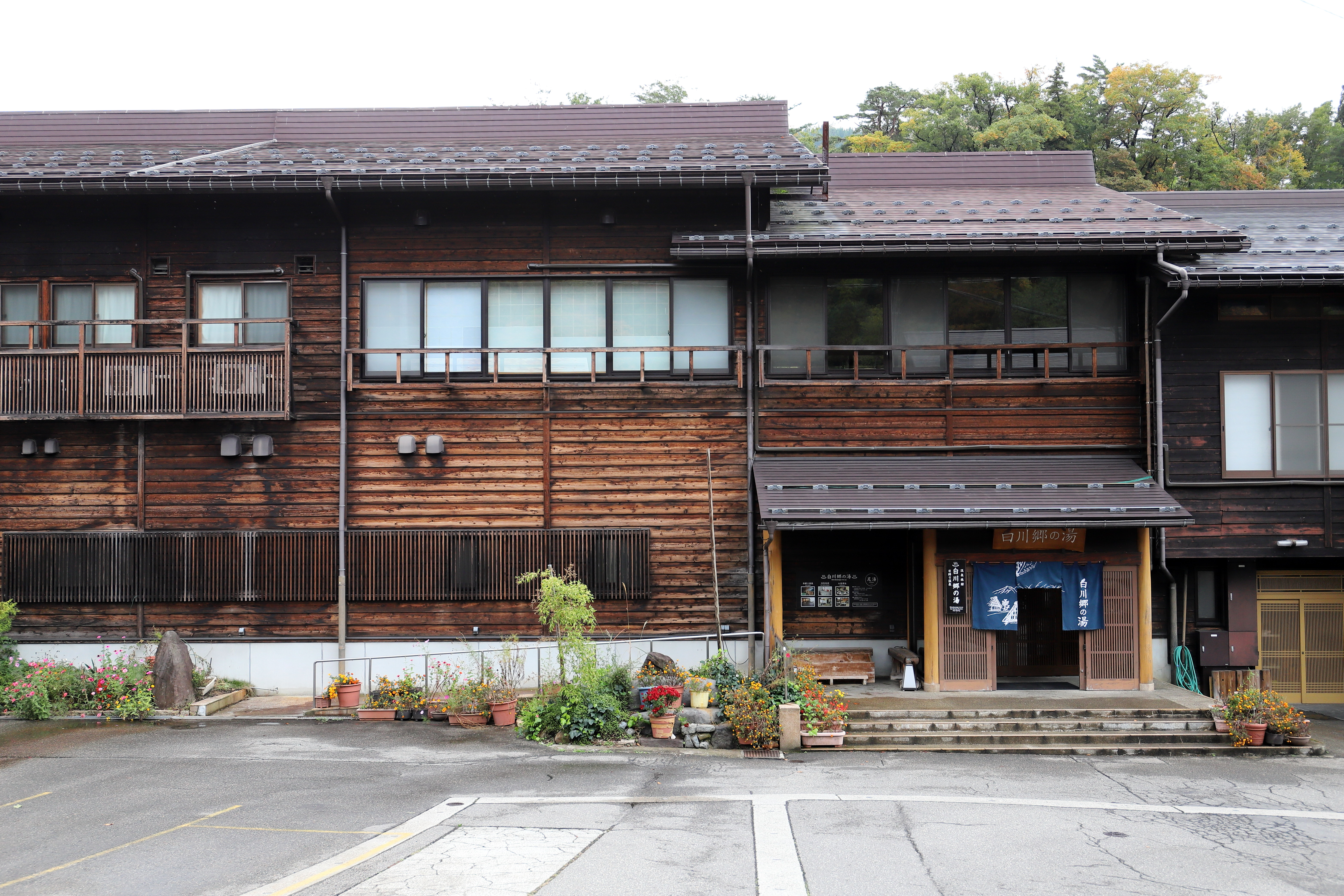 白川郷にある白川郷の湯